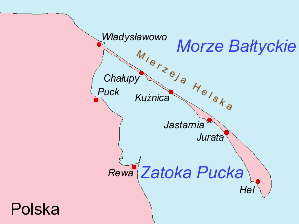 Mapa Mierzeja Helska i Zatoka Pucka